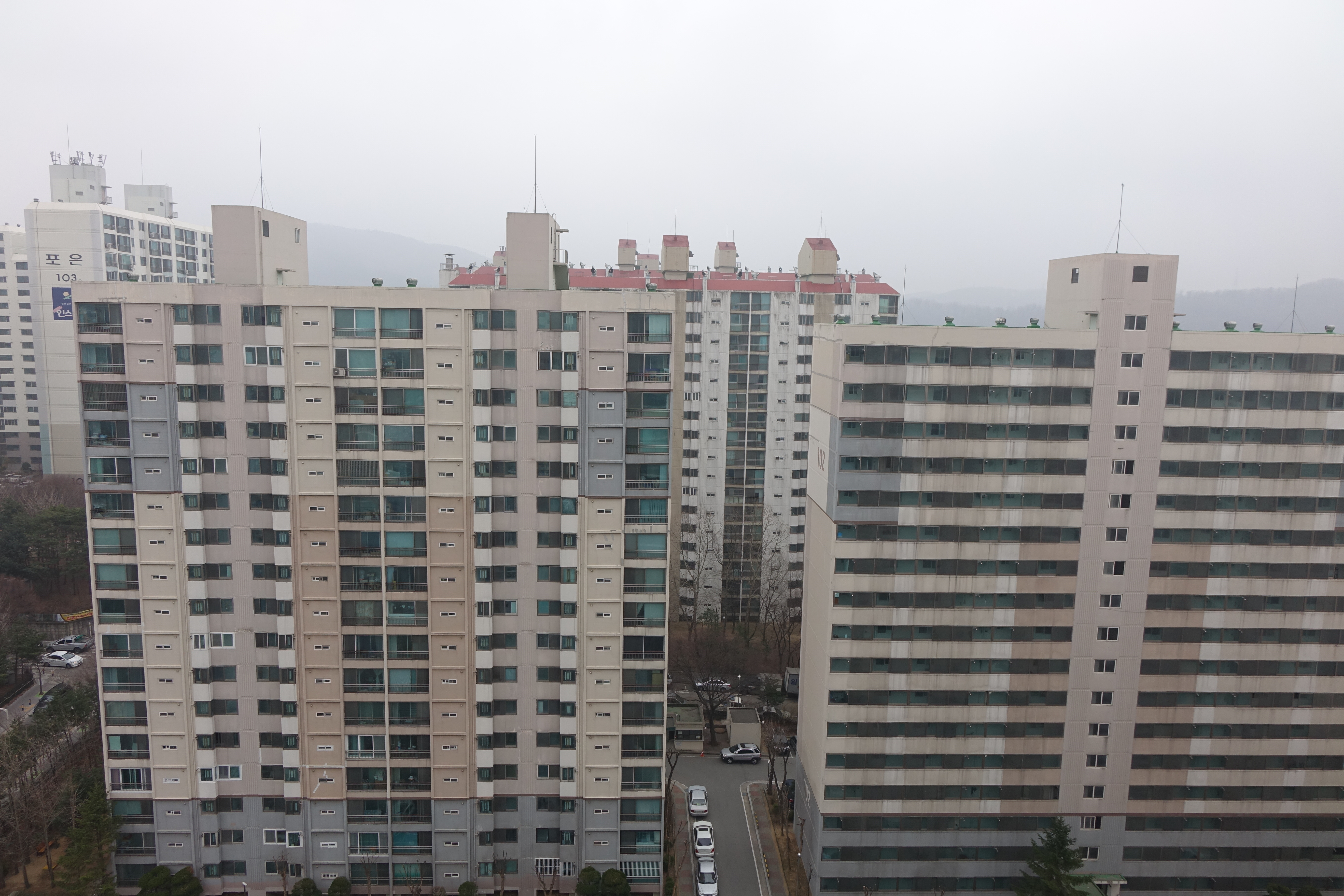 본 사진을 퍼블릭 도메인으로 배포합니다. 2015년 3월 31일. 최광모.